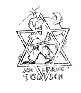 Michel Fingesten Ich lerne Jüdisch 1936. In: Theodor Simon: Essays. Mit 13 Bildbeigaben von Michel Fingesten. Berlin: Verlag Kedem, 1936